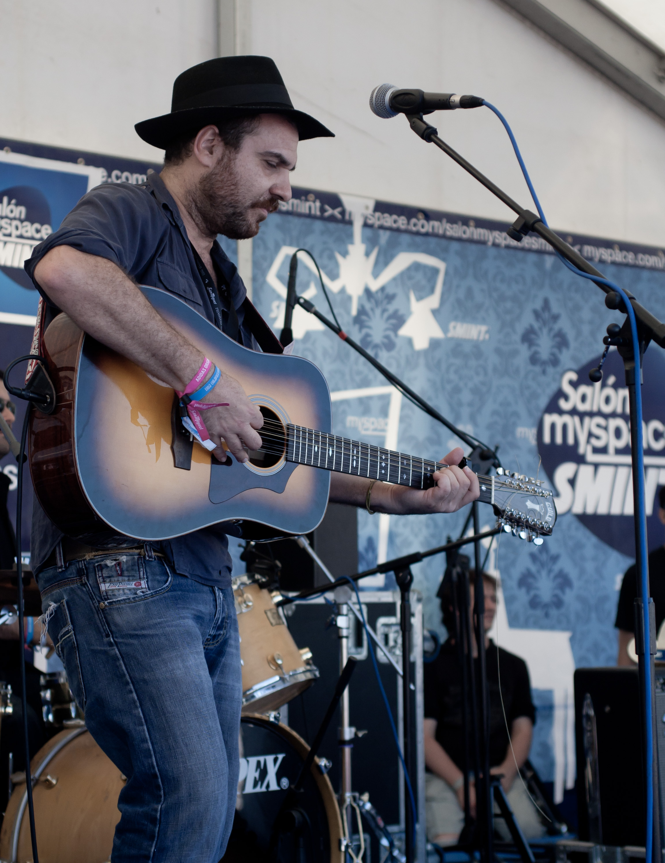 Eladio y Los Seres Queridos